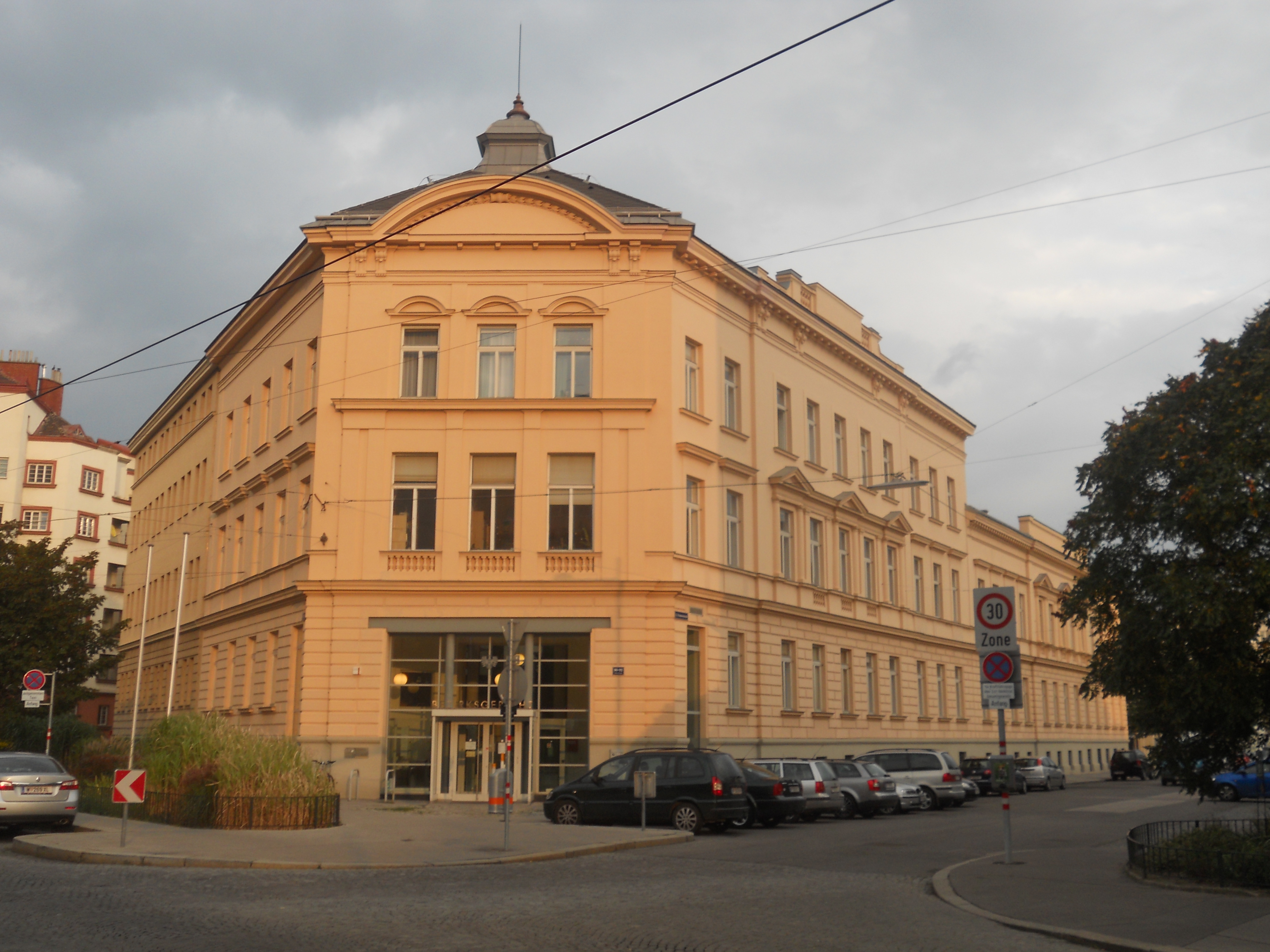 Haus Taborstraße 90-92, seit 2001 Sitz des Bezirksgerichtes Leopoldstadt